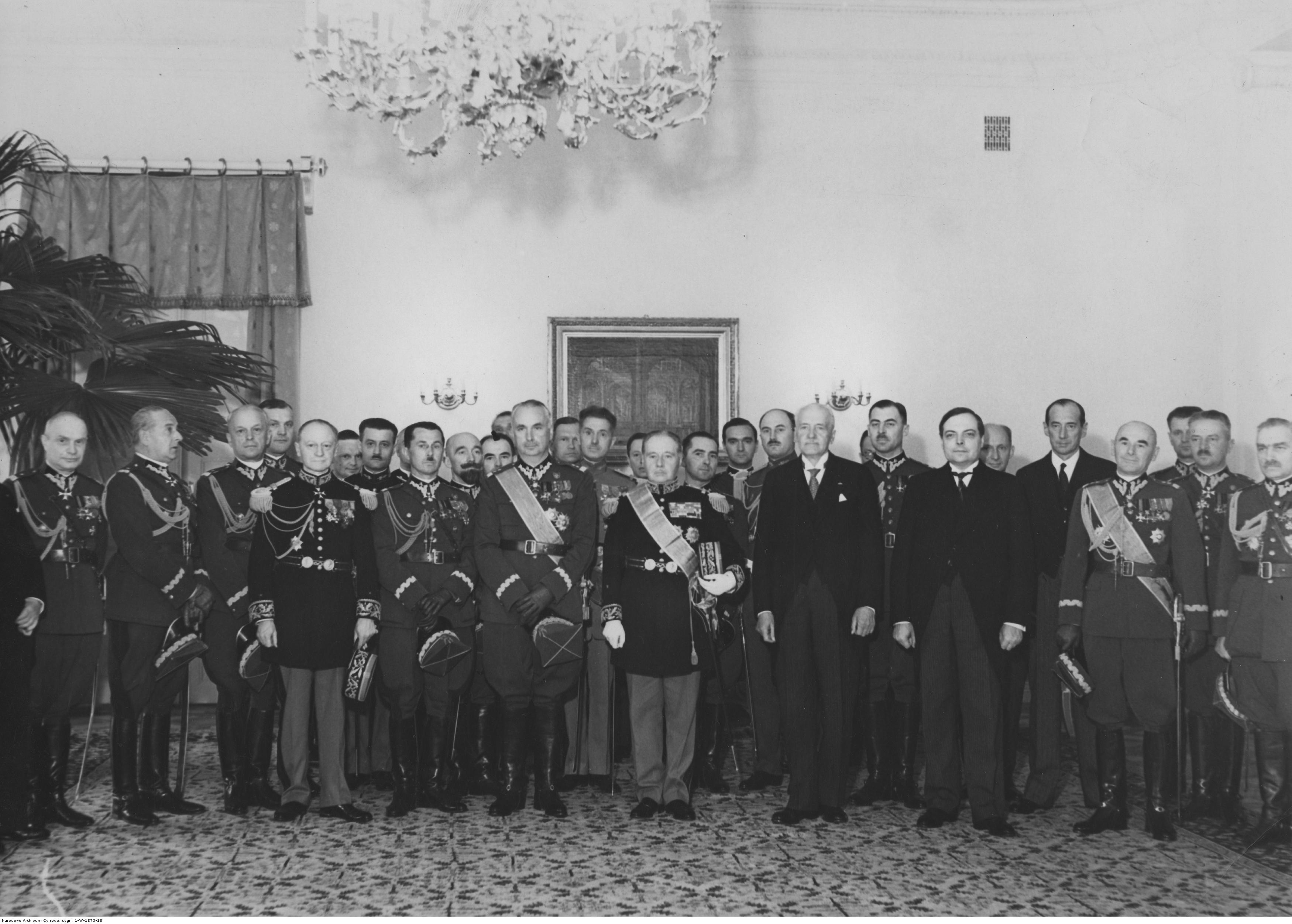 Wizyta gen. Maurice Gamelin w Warszawie. Fotografia grupowa uczestników uroczystości wręczenia Wielkiej wstęgi Orderu Polonia Restituta gen. Maurice Gamelin na Zamku Królewskim. Widoczni m.in.: prezydent RP Ignacy Mościcki (9. z prawej, w surducie), ambasador Francji w Polsce Leon Noel (7. z prawej, w surducie), minister spraw zagranicznych Józef Beck (5. z prawej), szef Kancelarii Cywilnej Prezydenta RP Stanisław Łepkowski (na lewo za J. Beckiem), gen. Maurice Gamelin ( w środku, przepasany Wielką Wstęgą), gen. Charles Henri d`Arbonneau (5. z lewej), generałowie dywizji: Edward Rydz-Śmigły (4. z prawej), Felicjan Sławoj Składkowski (1. z prawej), Kazimierz Sosnkowski (na lewo od gen. Gamelina), generałowie brygady: Władysław Bończa-Uzdowski (1. z lewej), Bolesław Wieniawa-Długoszowski (2. z lewej), gen. Bronisław Regulski (3. z lewej), Janusz Głuchowski (2. z prawej), Wacław Stachiewicz (między Sosnkowskim a d`Arbonneau), Kazimierz Schally (8. z prawej), Tadeusz Malinowski (między Stachiewiczem a Sosnkowskim), płk Wojciech Fyda (na prawo za gen. M. Gamelienem), adiutant prezydenta RP, kpt Józef Hartman (na lewo za gen. Głuchowskim), rtm Edward Mańkowski. Koncern Ilustrowany Kurier Codzienny - Archiwum Ilustracji. Sygnatura: 1-W-1873-18